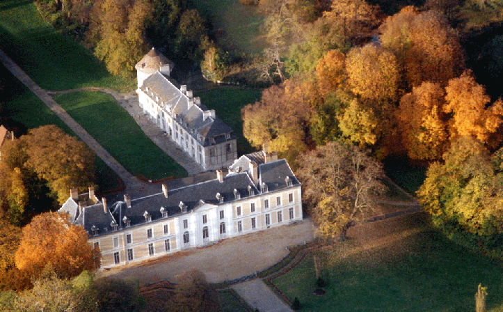 Vue aérienne du Chateau de Brou et ses terres